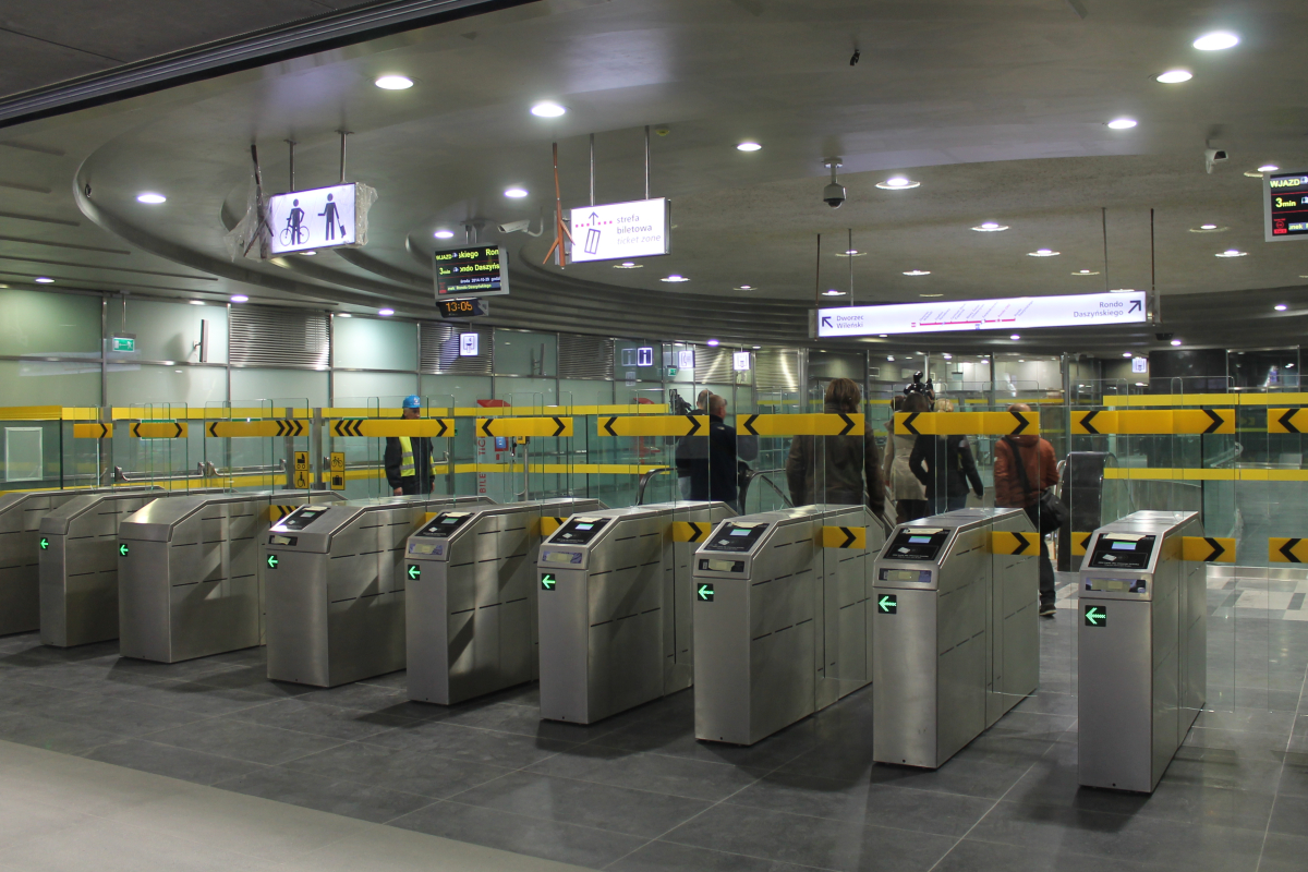 Bramki biletowe w hali odpraw na wschodnim końcu stacji C10 Rondo ONZ.